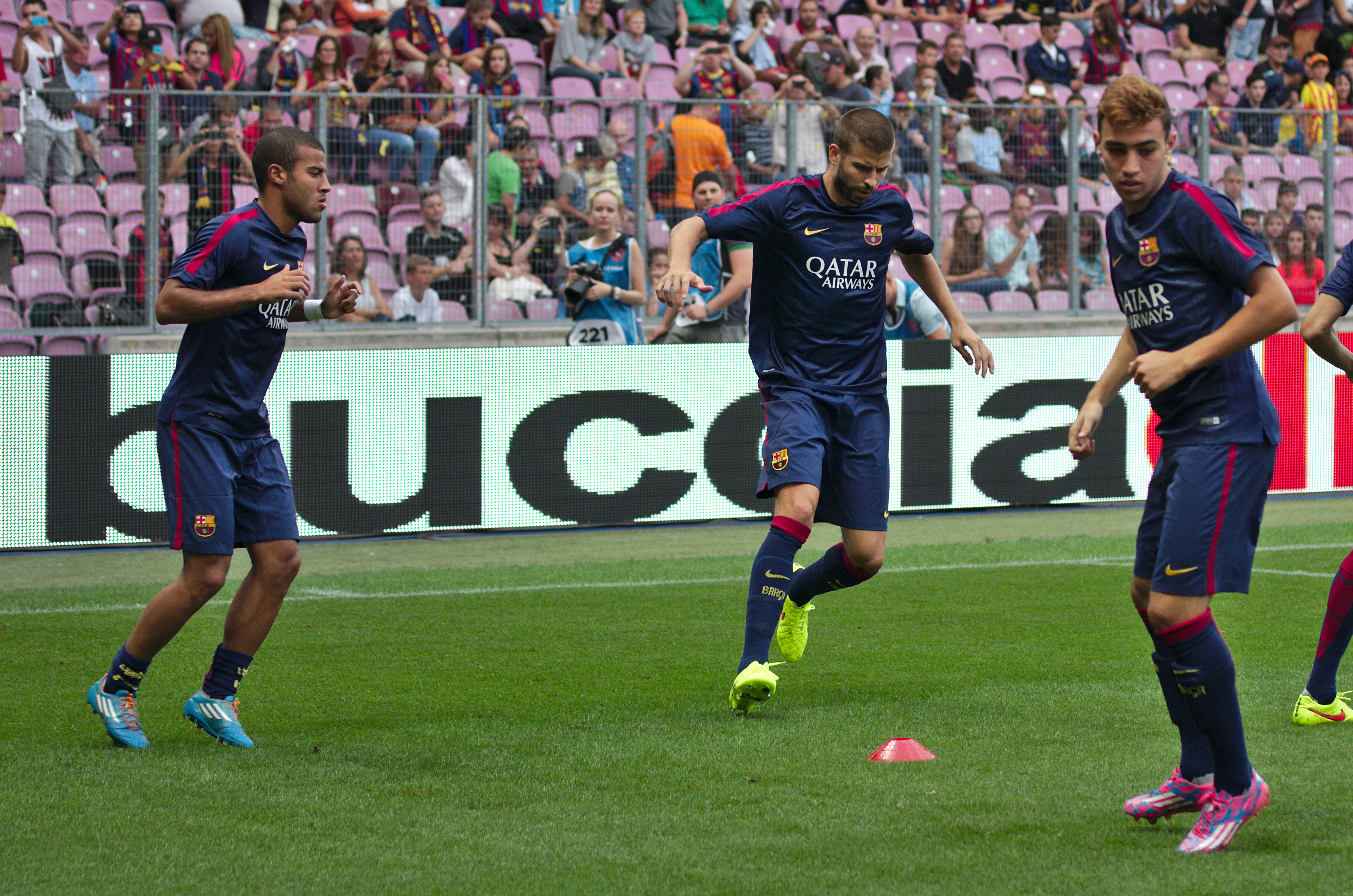 Barça - Napoli - 20140806 - Echauffement